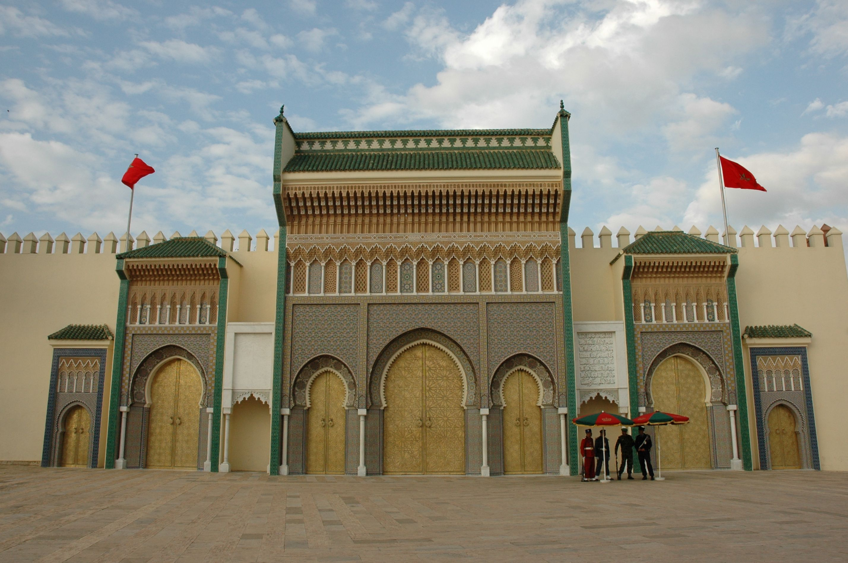 Fes - Palau Reial - Porta principal